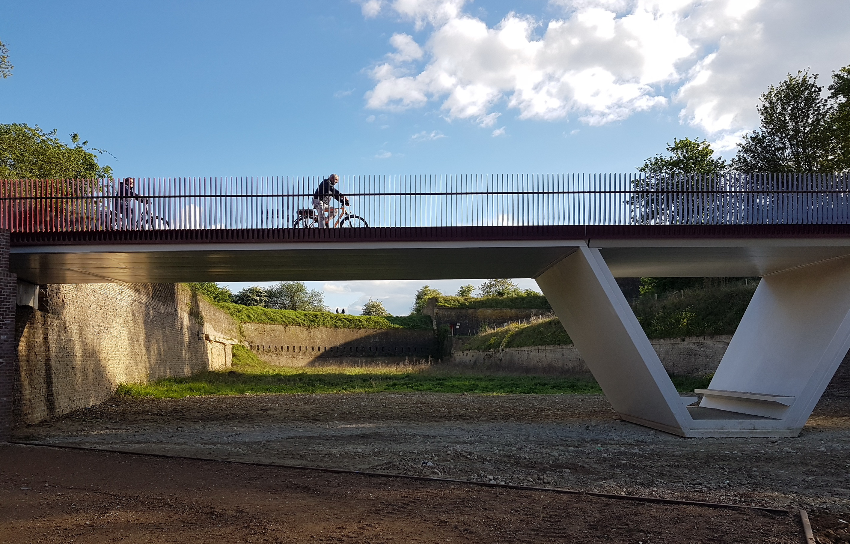 Zicht op een fiets- en voetgangersbruggen nabij de Cabergerweg in Maastricht. De brug is onderdeel van de nieuw aangelegde droge gracht tussen de Hoge en Lage Fronten (eigenlijk: Linie van Dumoulin en Nieuwe Bossche Fronten), die twee losse delen van het Frontenpark met elkaar verbindt.